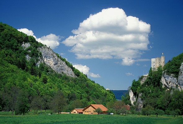 Büsserach: Ruine Neu Thierstein